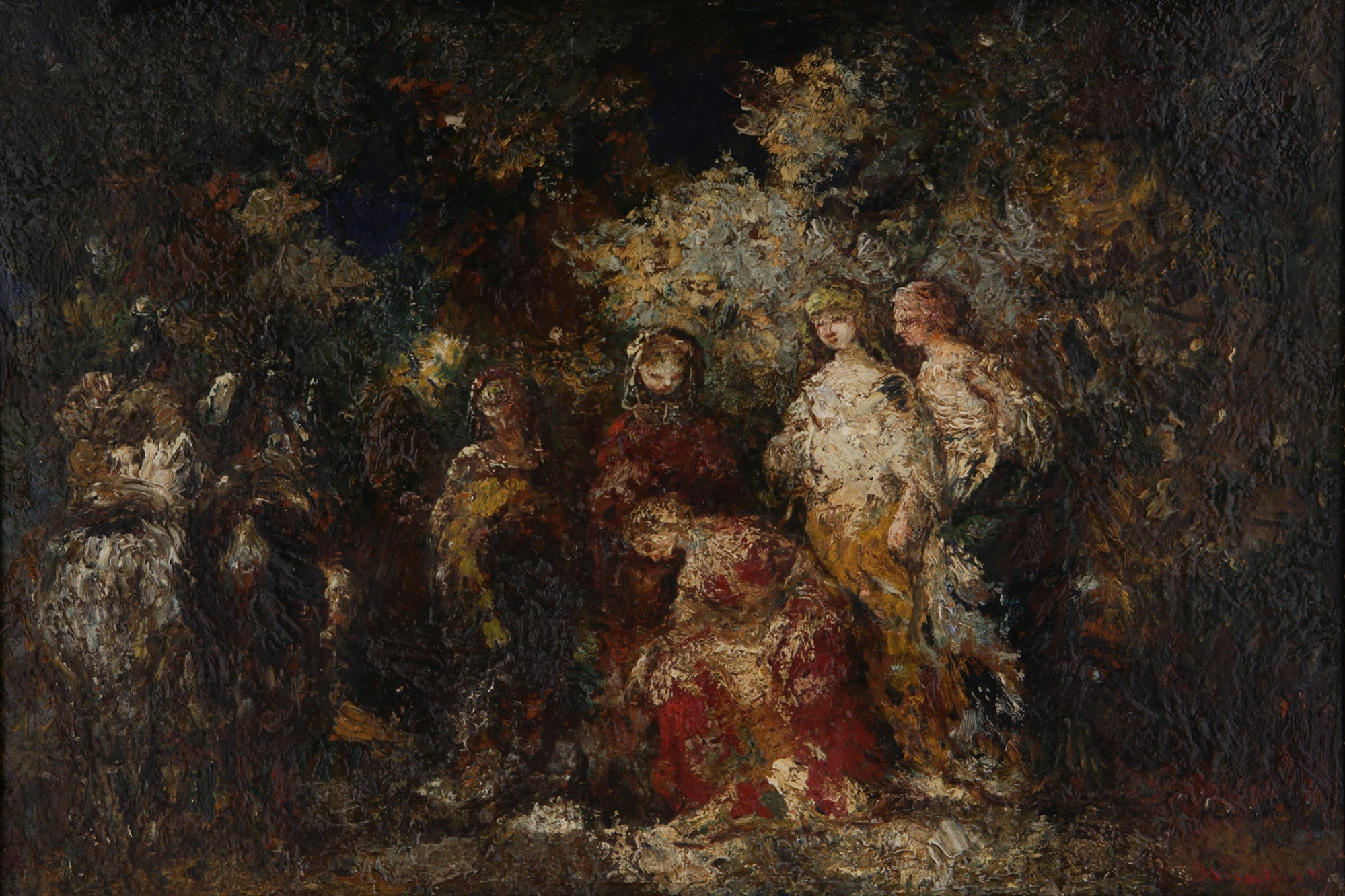 La Reverence.